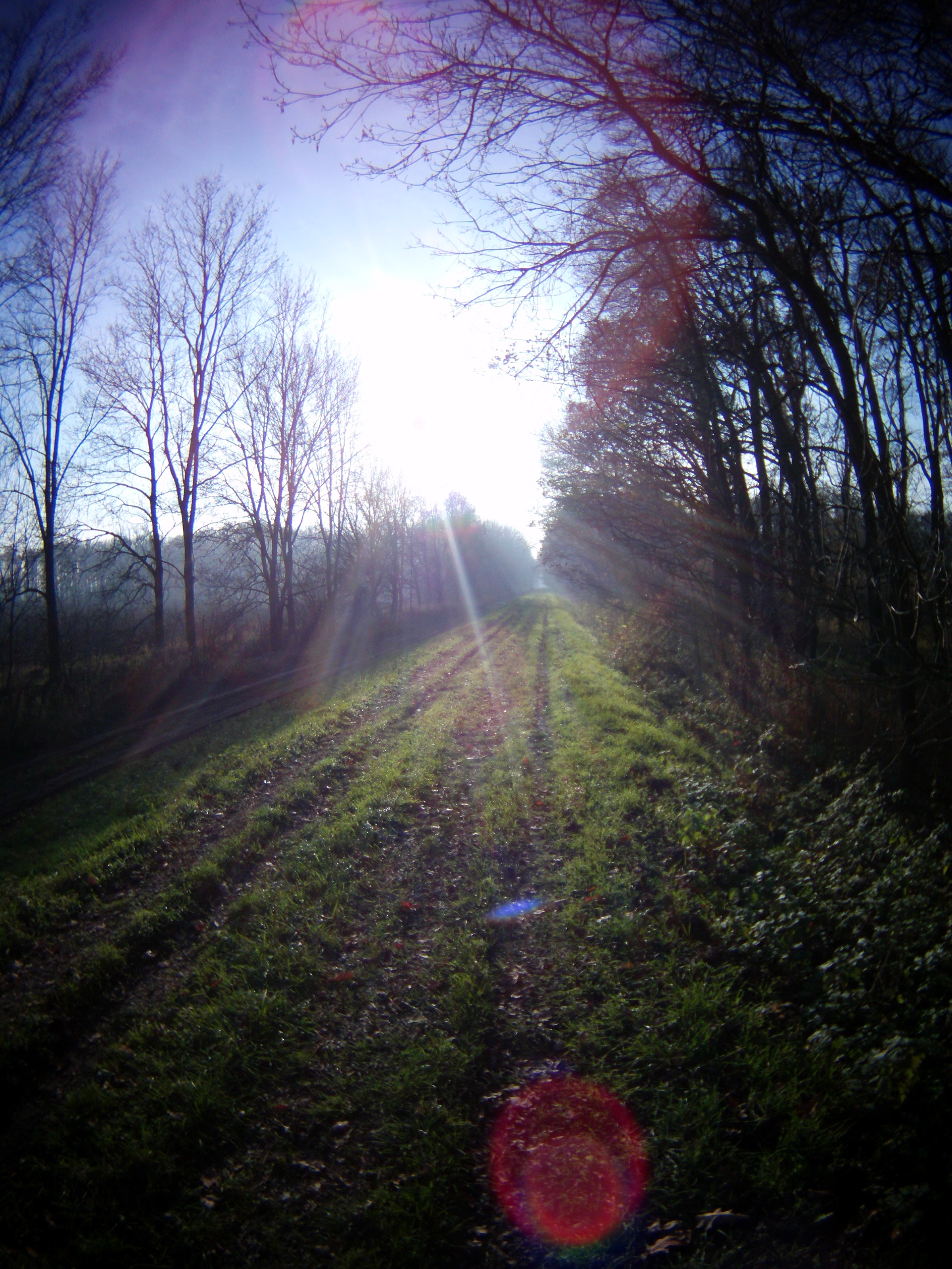 Hráz záplavového území lužního lesa